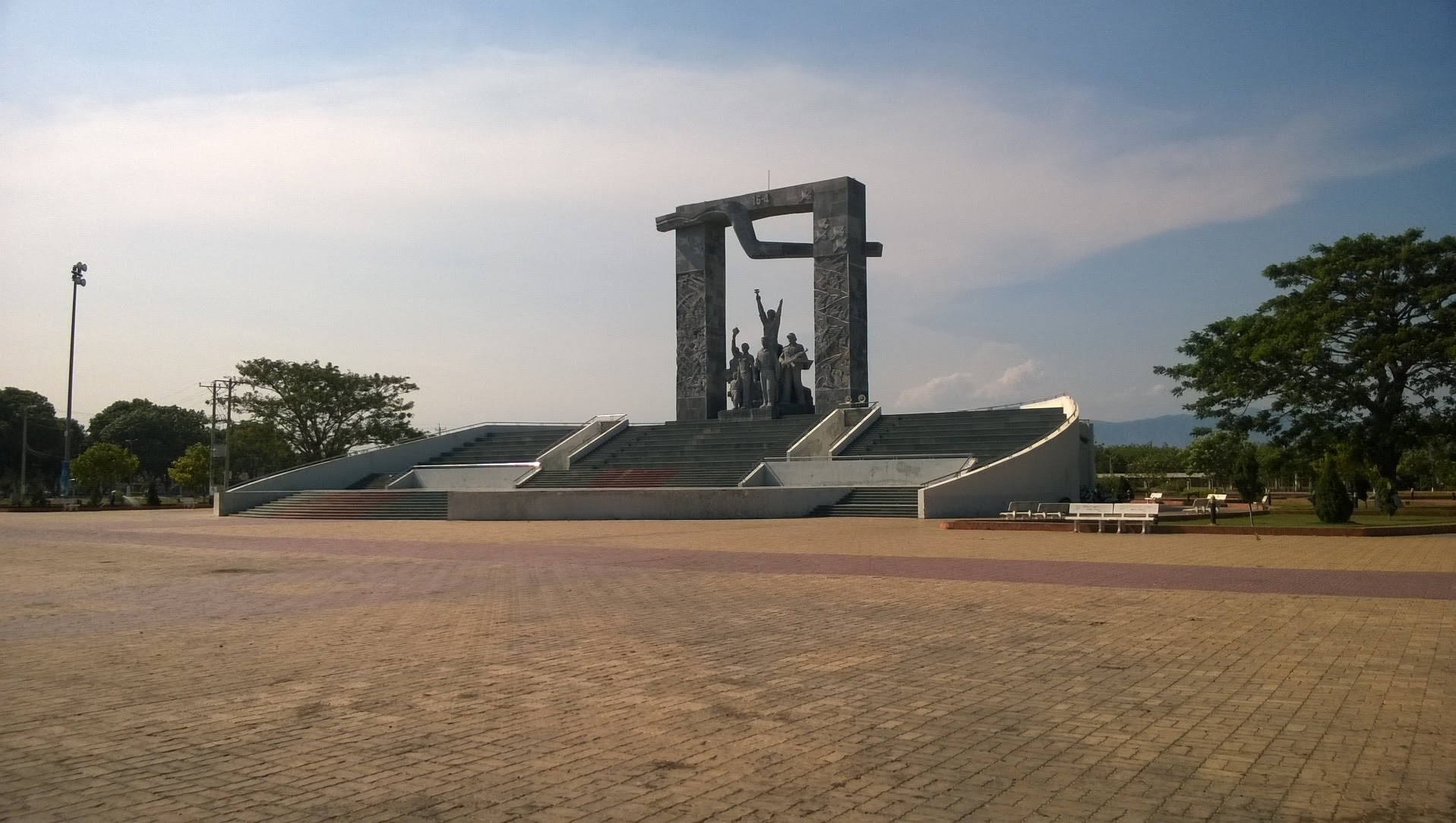 Tượng đài Chiến thắng tỉnh Ninh Thuận